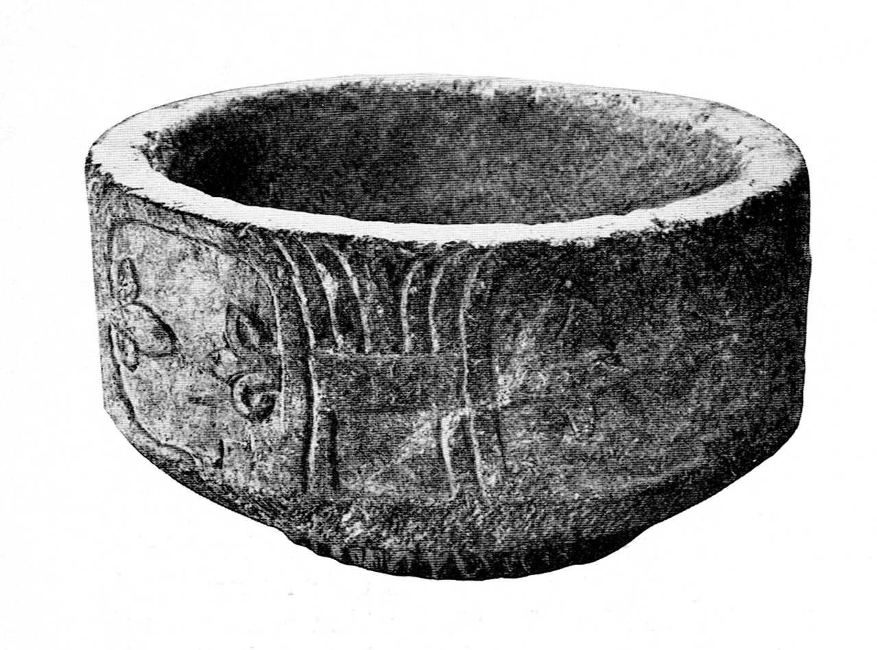 Bärfendals kyrka. Dopfunt